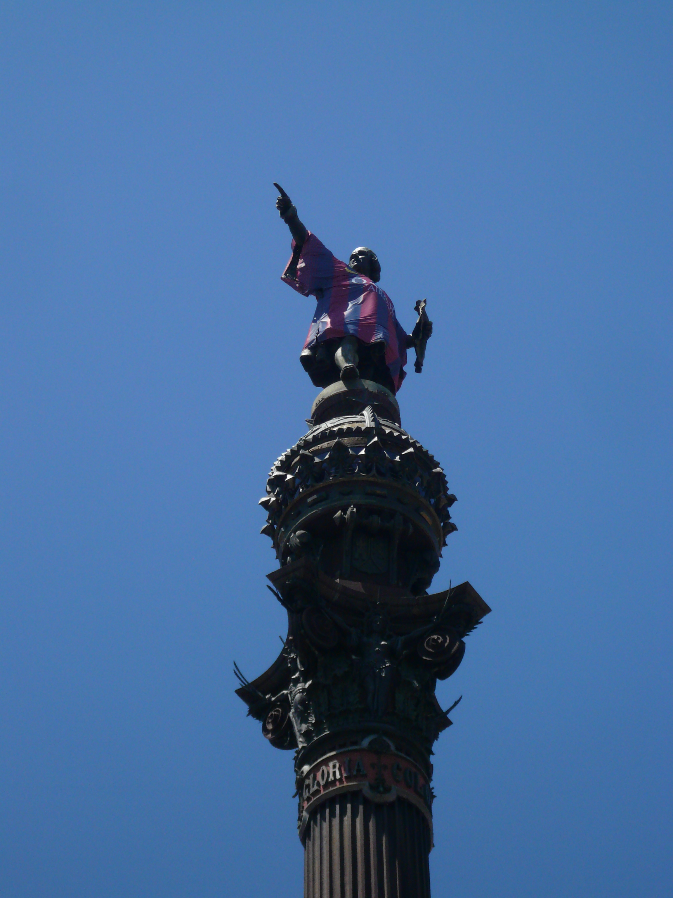 Cristòfor Colom. Portal de la Pau, monument a Colom (Barcelona). Escultor: Rafael Atché. Arquitecte: Gaietà Buigas. Material: bronze (originalment daurat). 1888. 95″ N, 2° 10′ 40.12″ E